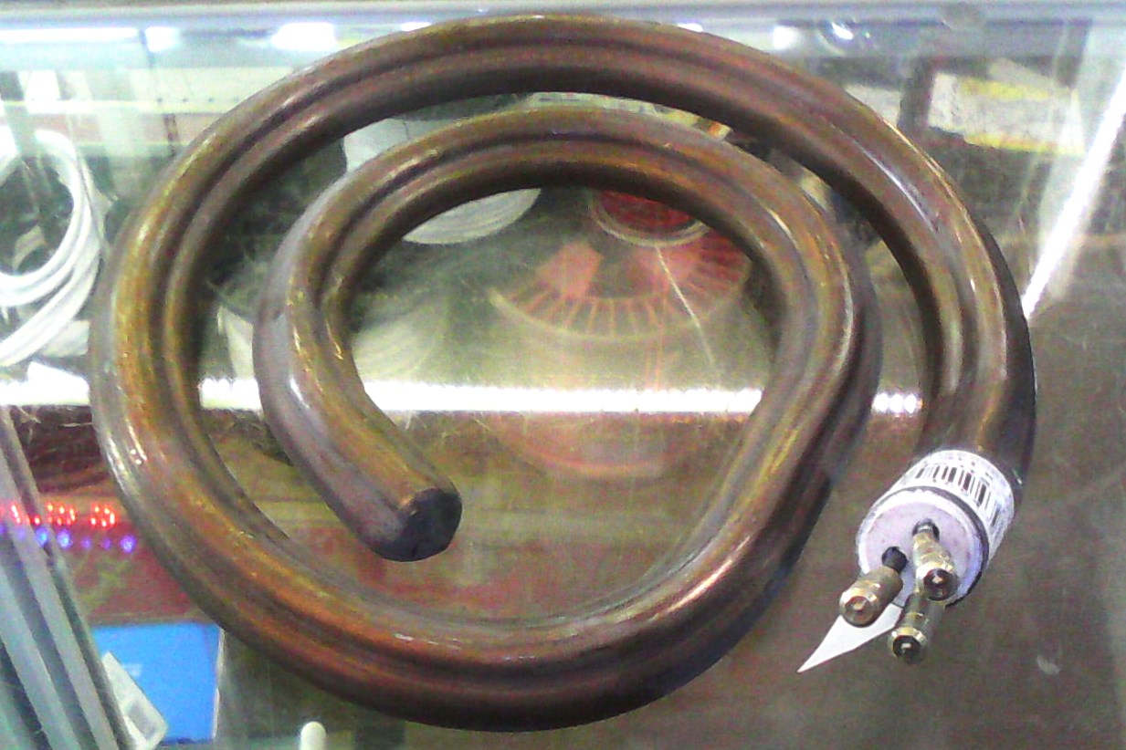 Трубчатый электронагреватель (ТЭН) электроплиты спиральный двухконцевыми выводами. Регулирование мощности путём сочетания переключением выводов на переключателе.